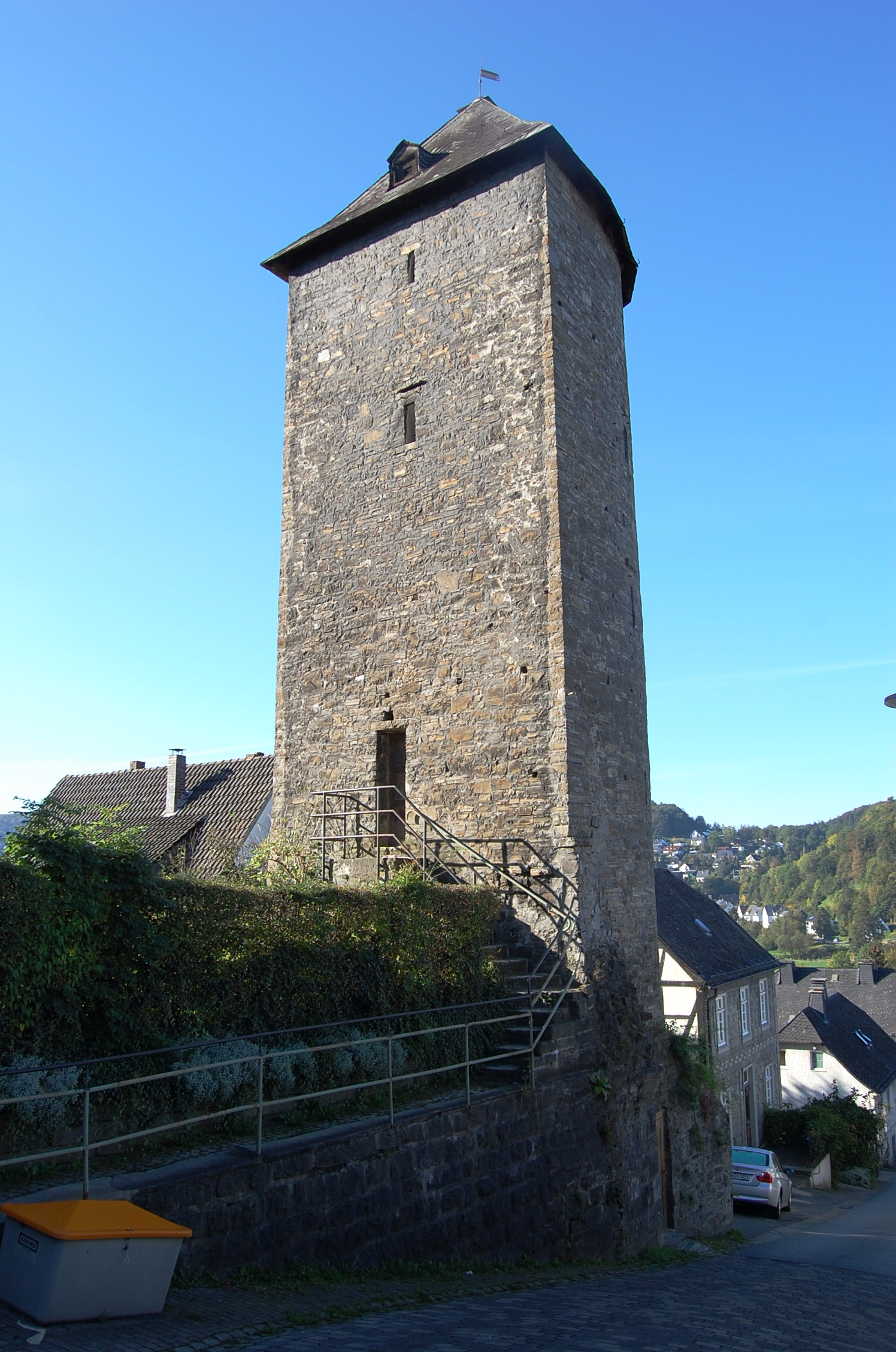 Limpsturm, Arnsberg